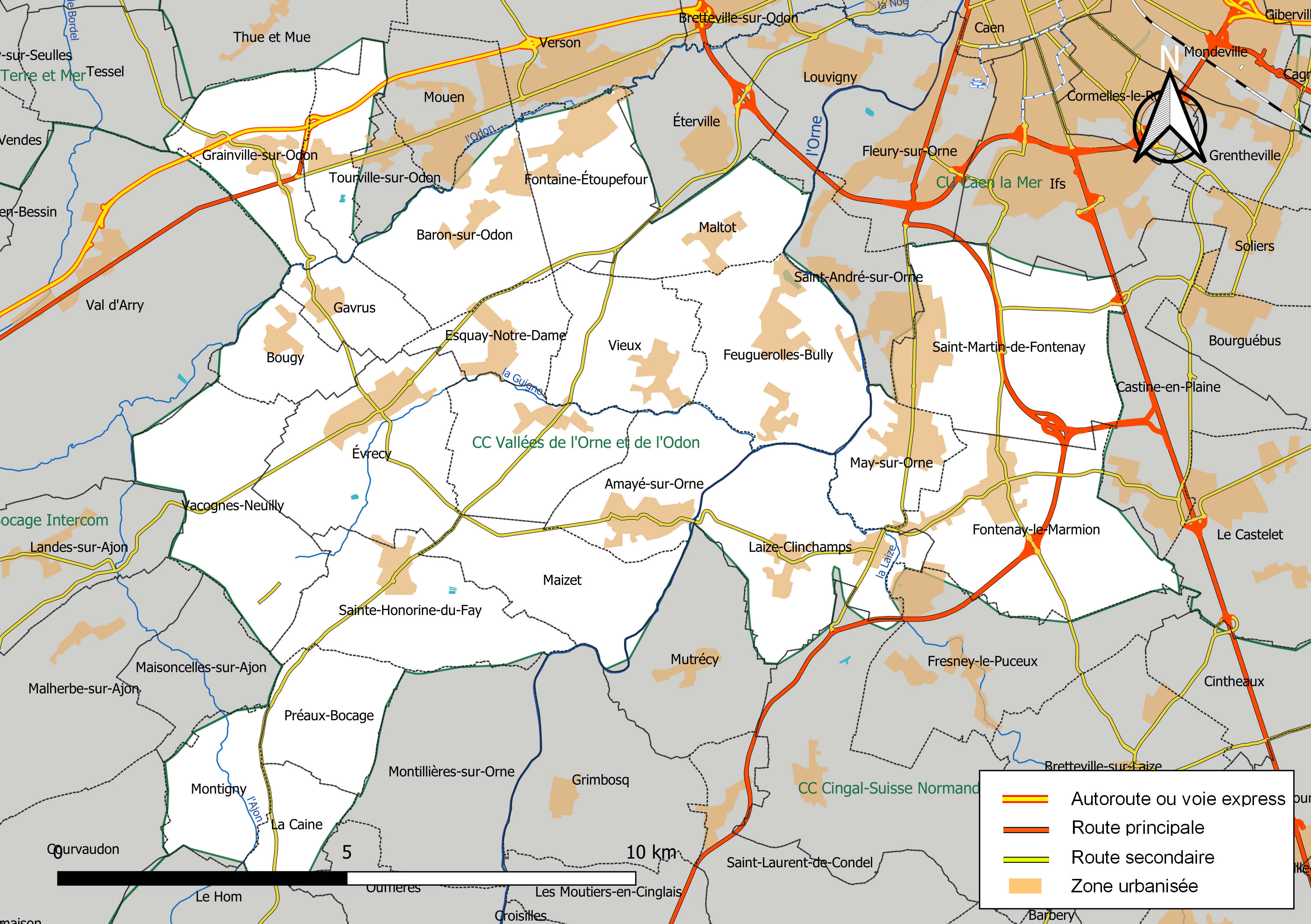 Carte géographique de la Communauté de communes Vallées de l'Orne et de l'Odon, département du Calvados, France. Composition au 1er janvier 2019.